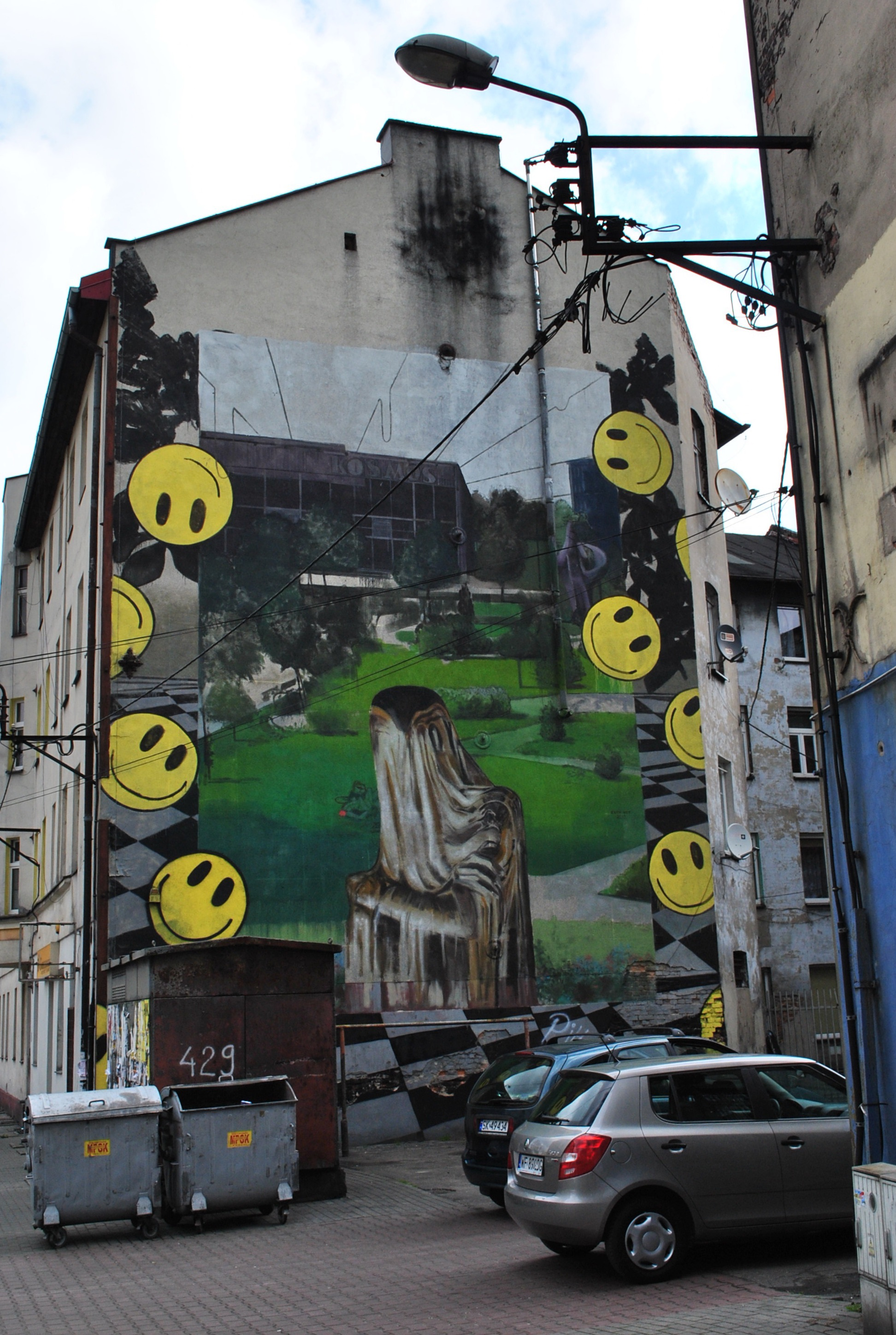 Katowice - Załęże. Mural na ścianie kamienicy przy ul. Anioła